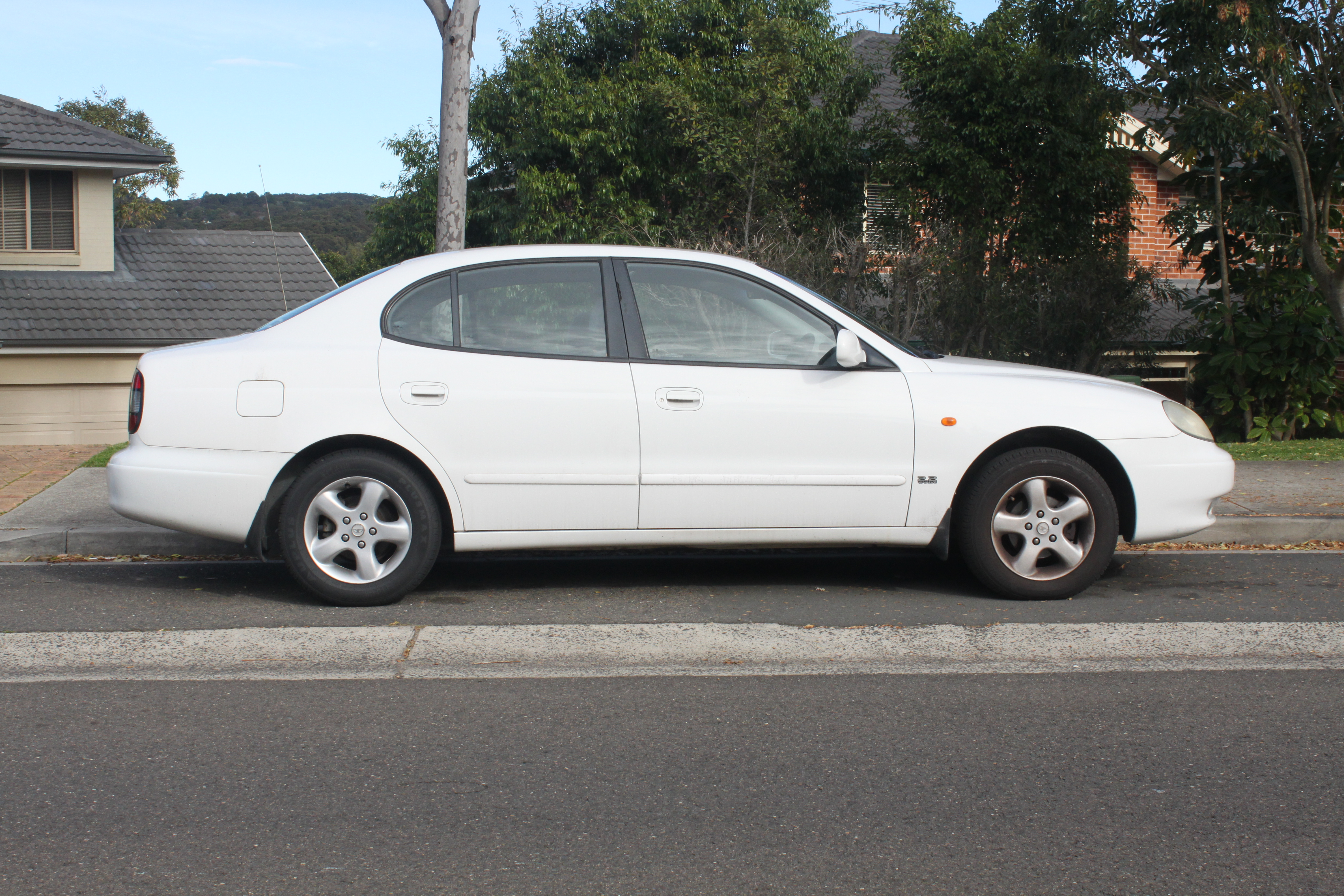 Daewoo Leganza V100